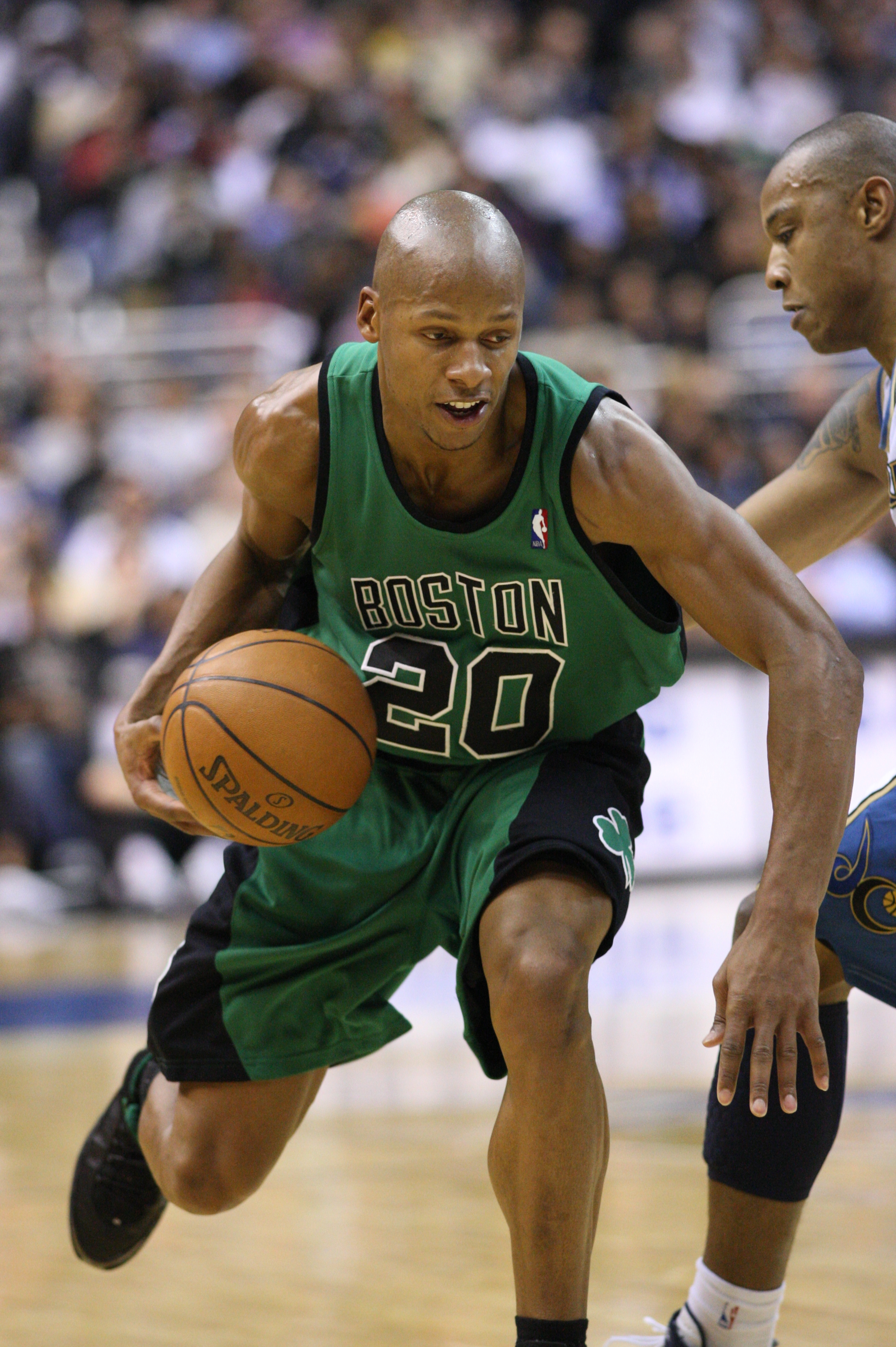 Ray Allen sous le maillot des Boston Celtics en train de dribbler